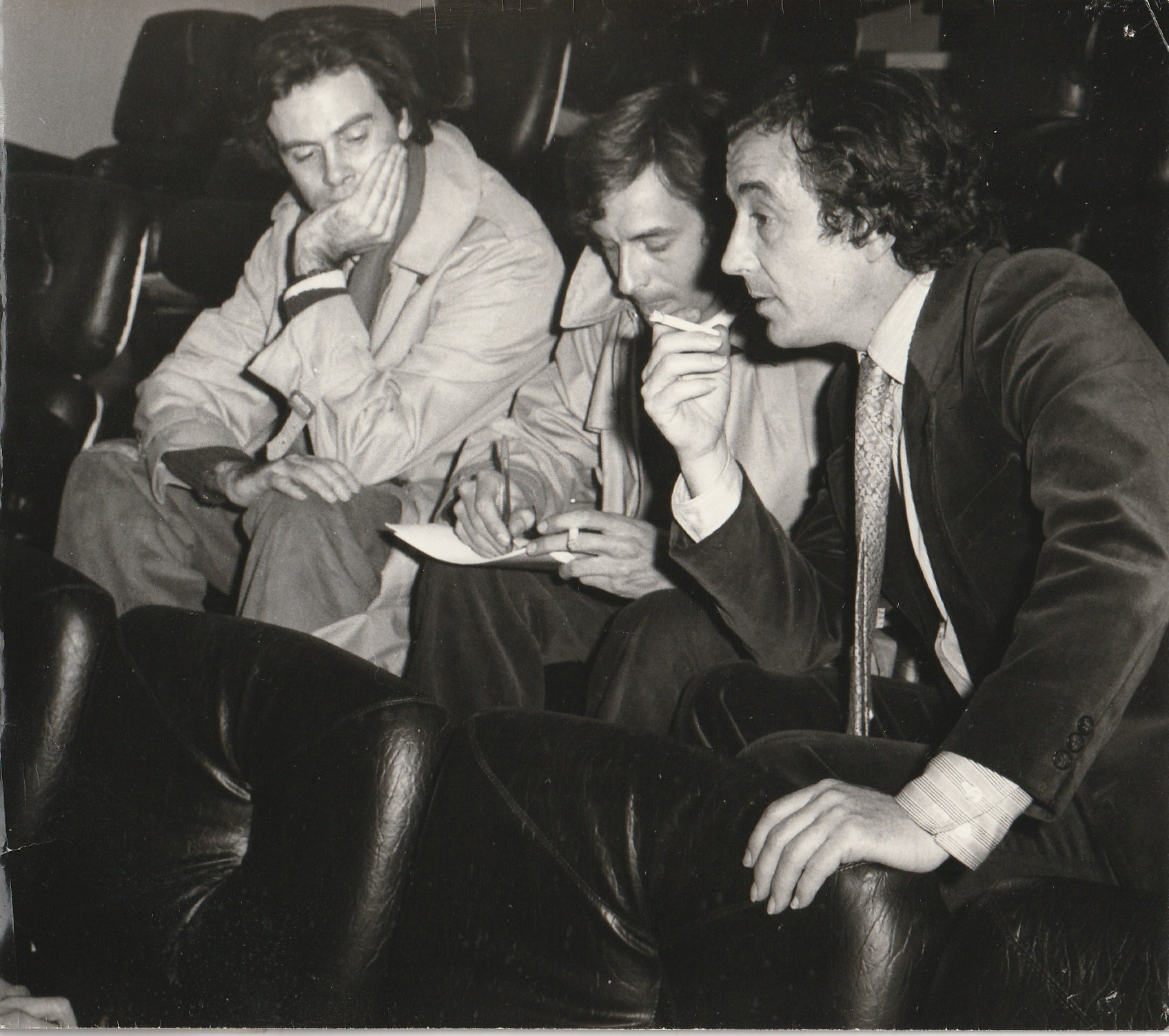 Interview pour la sortie en salle de Lacombe Lucien